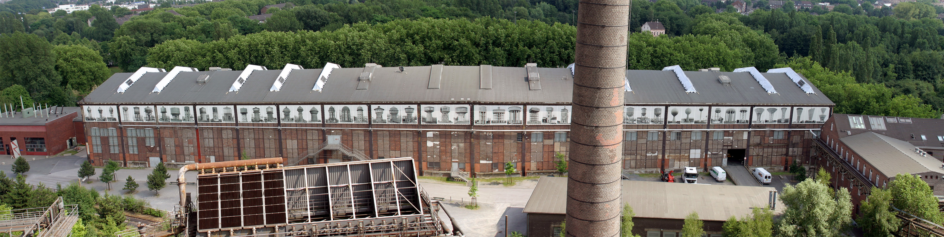 Landschaftspark Duisburg, Kraftzentrale, Panoramaaufnahme vom Hochofen aus gesehen